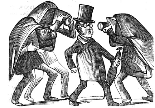 Der Münchener Punsch macht sich über Georg von Vincke lustig, der sich nicht photographieren lassen möchte: Als die Litho- und Photographen auf ihn einstürmten, rief er aus:" Nein, sie sollen mich nicht haben!" Bei einem Photographen, der ihn einmal aufgenommen, ließ er sogar die Glasplatte zerstören, mit der Bemerkung, seit dem großen Amendement mache man sich in Deutschland von ihm ohnehin sehr viele negative Vorstellungen. Münchner Punsch vom 3. März 1861